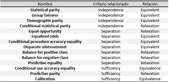 Relación entre criterios de equidad para la página Equidad (aprendizaje automático)